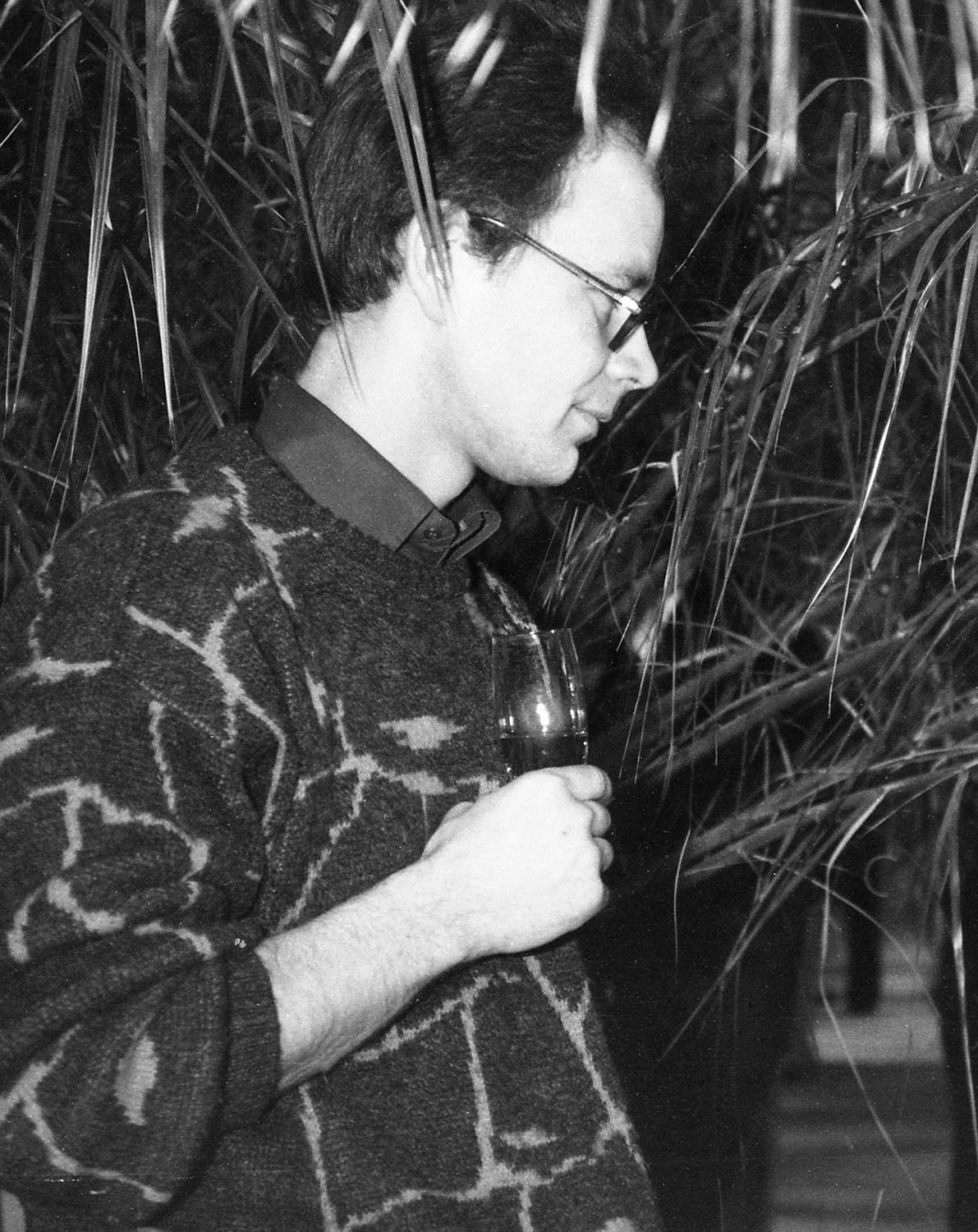 Madis Jürgen ajakirjanik 93